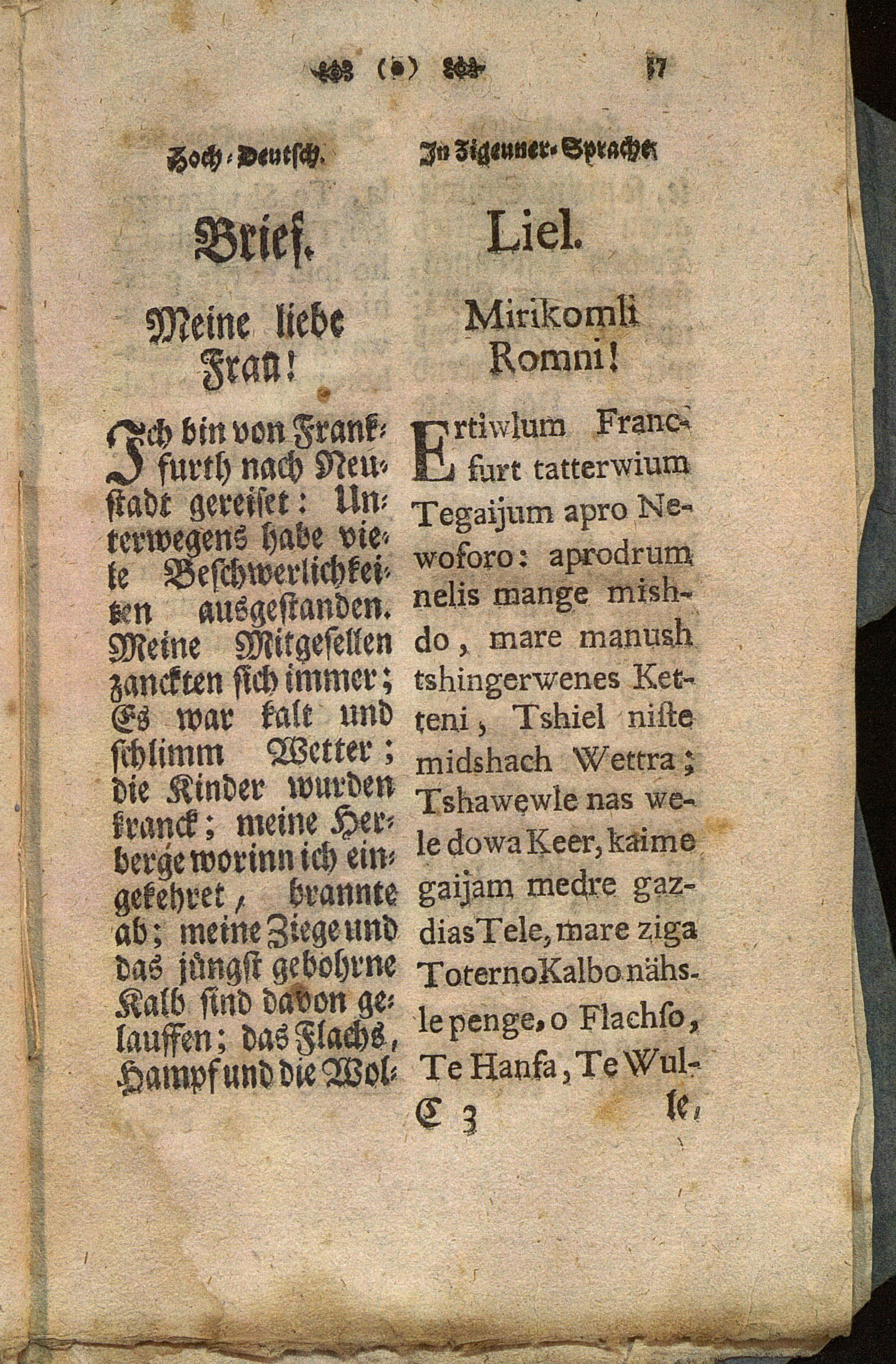 Anfang des "Schreibens eines Zigeuners an seine Frau ..."